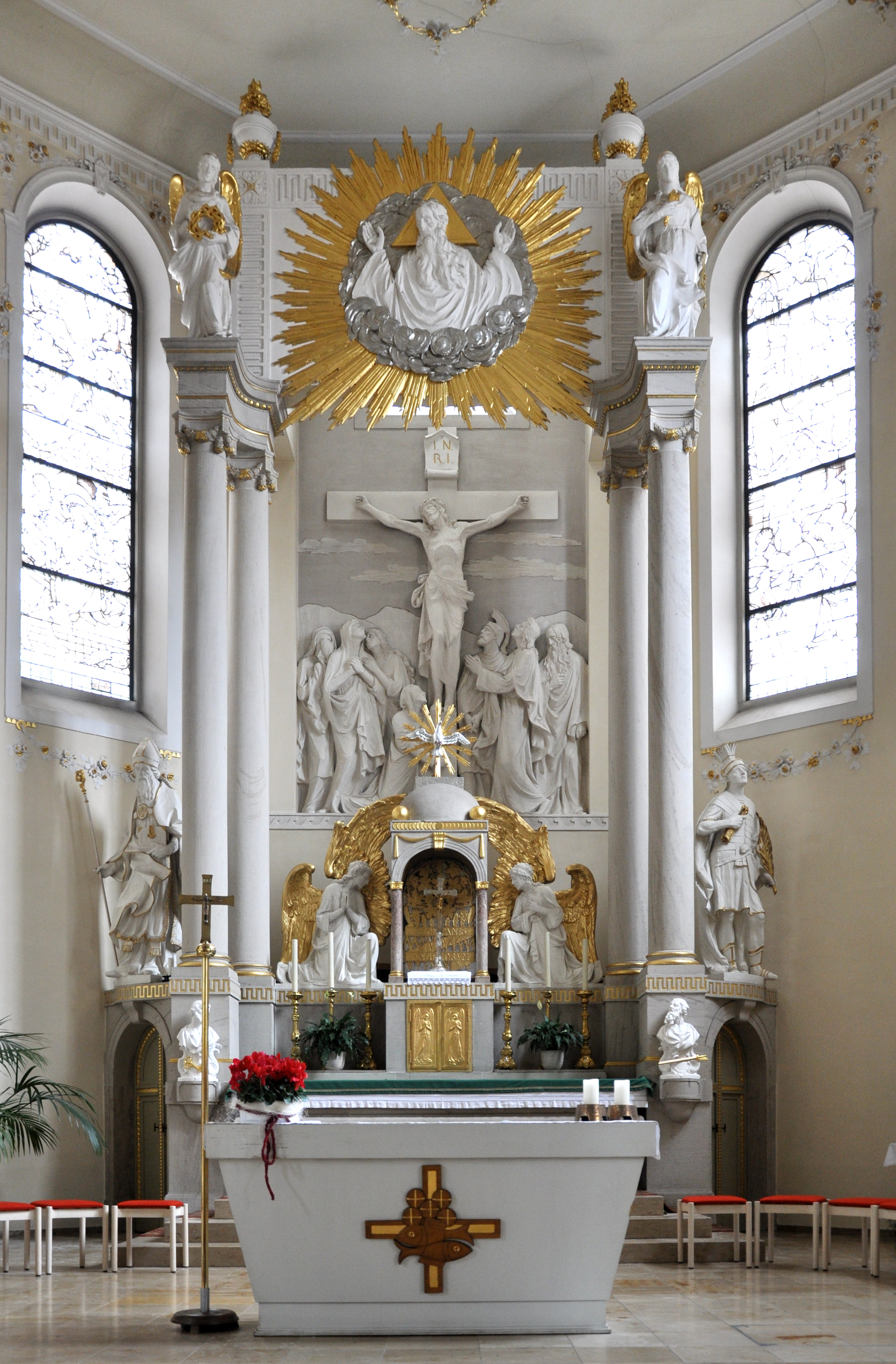 Haslach im Kinzigtal, katholische Pfarrkirche St. Arbogast, Hochaltar von August Schädler (1862–1925), 1907